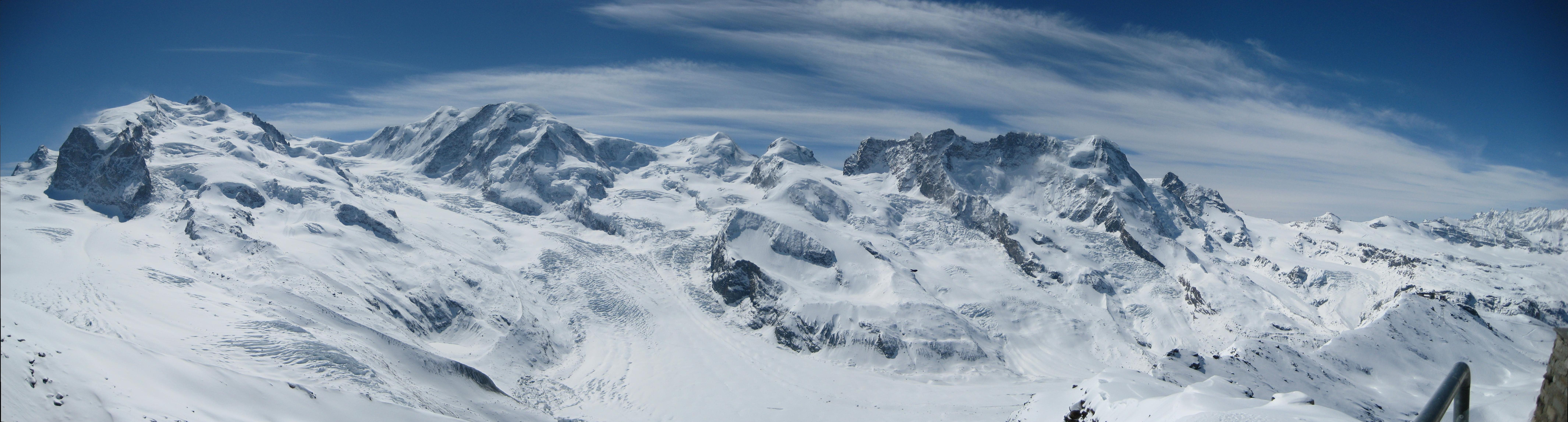 Panorama du Massif du Mont Rose (depuis le Stockhorn, 3405m)